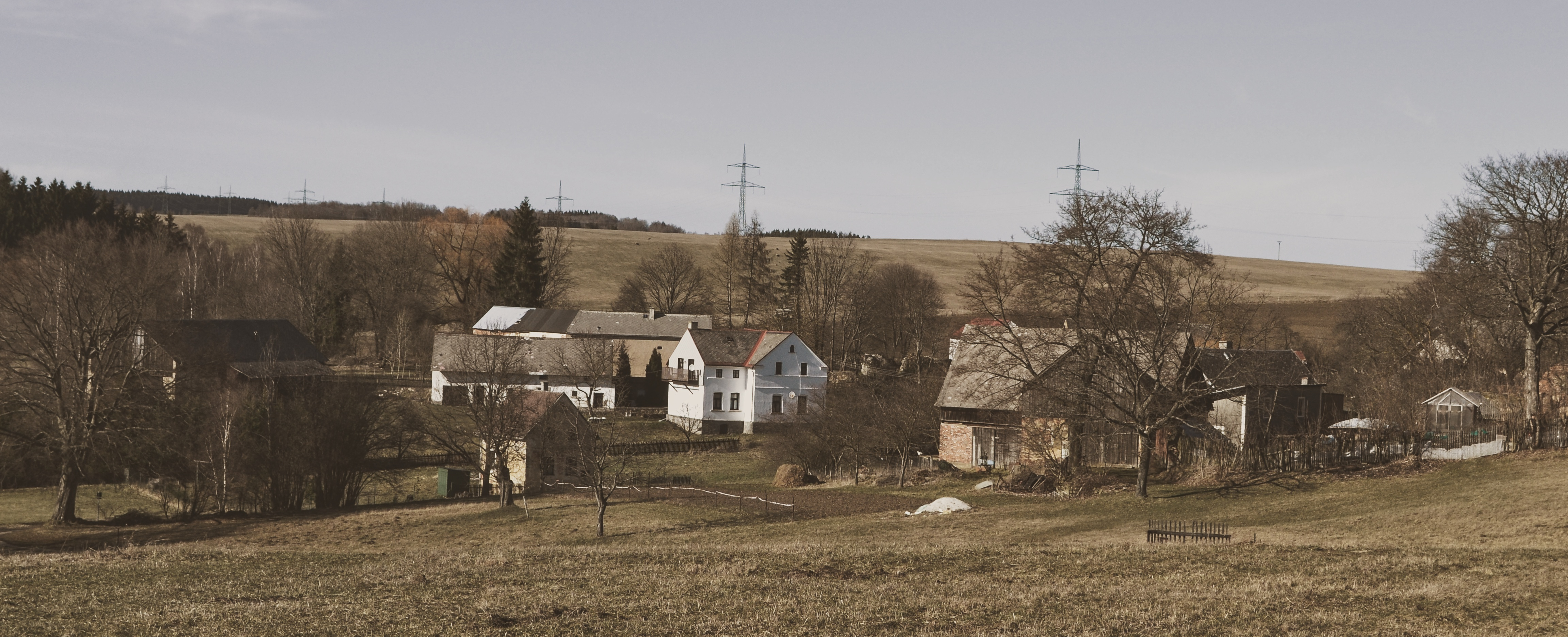 Kohoutov